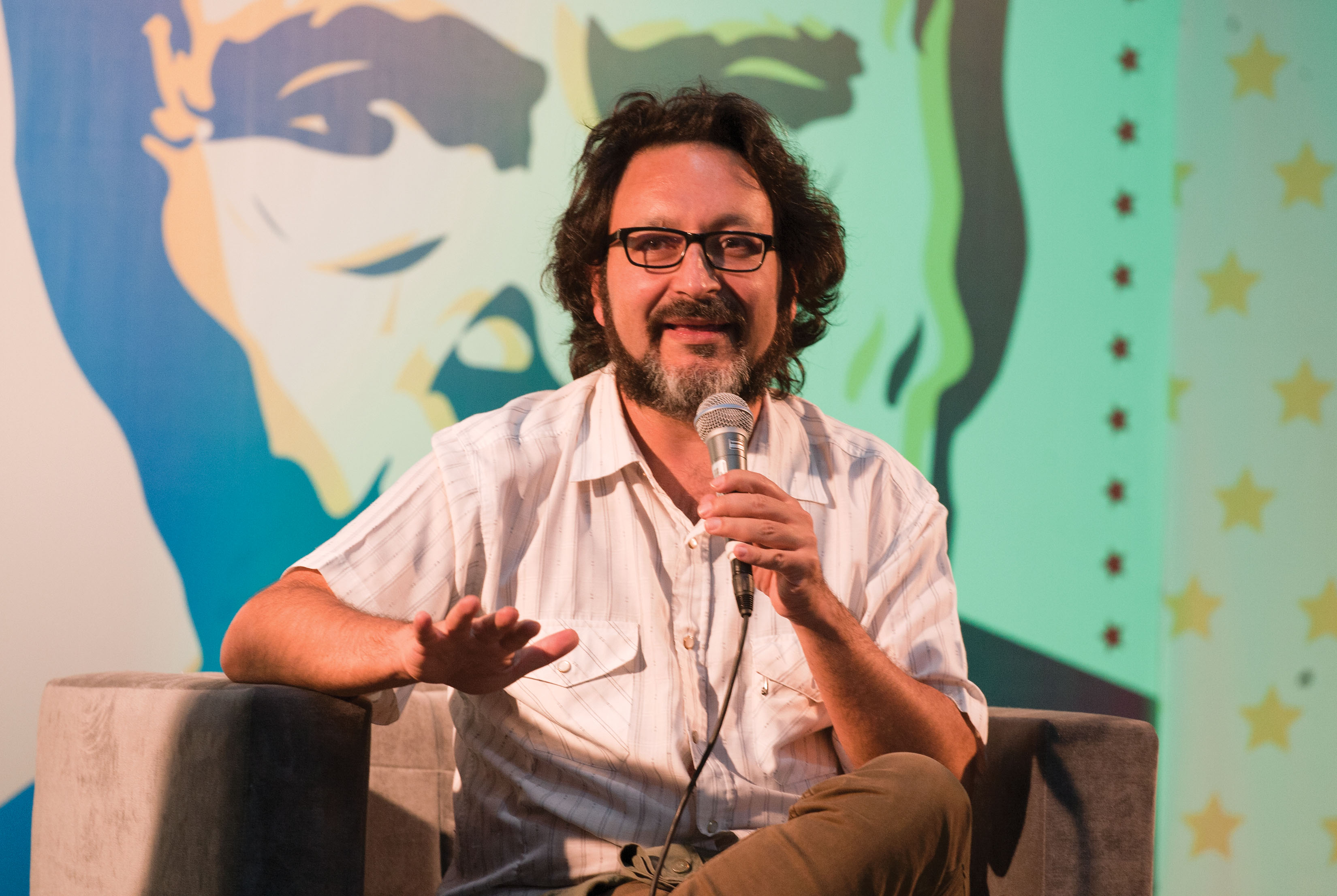 Lunes, 12 de Octubre 2015. Presentación del libro Nu)n(ca de Luigi Amara con Ursus Sartoris y el autor en el Foro Eraclio Zepeda de la XV FILZ. Foto: Antonio Nava / Secretaria de Cultura Lunes, 12 de Octubre 2015. Presentación del libro Nu)n(ca de Luigi Amara con Ursus Sartoris y el autor en el Foro Eraclio Zepeda de la XV FILZ. Foto: Antonio Nava / Secretaria de Cultura